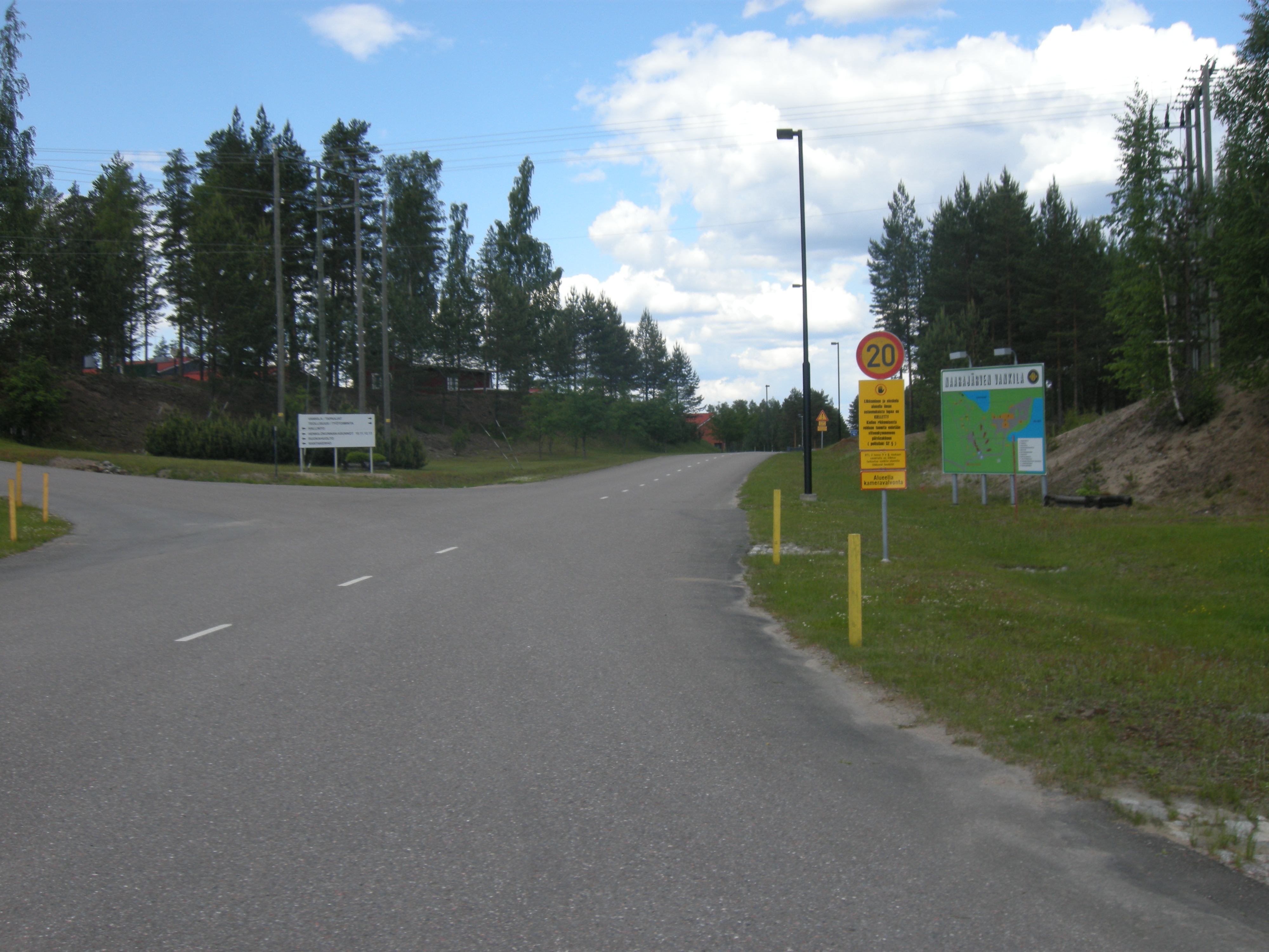 Kaakkois-Suomen aluevankilaan kuuluva Naarajärven vankila tieltä katsottuna.